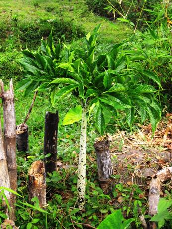 Walur Amorphhophallus variabilis, fase vegetatif